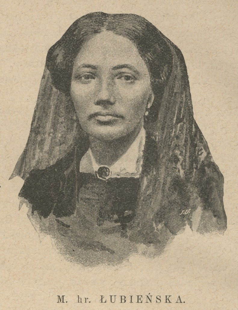 M.[aria] hr. Łubieńska